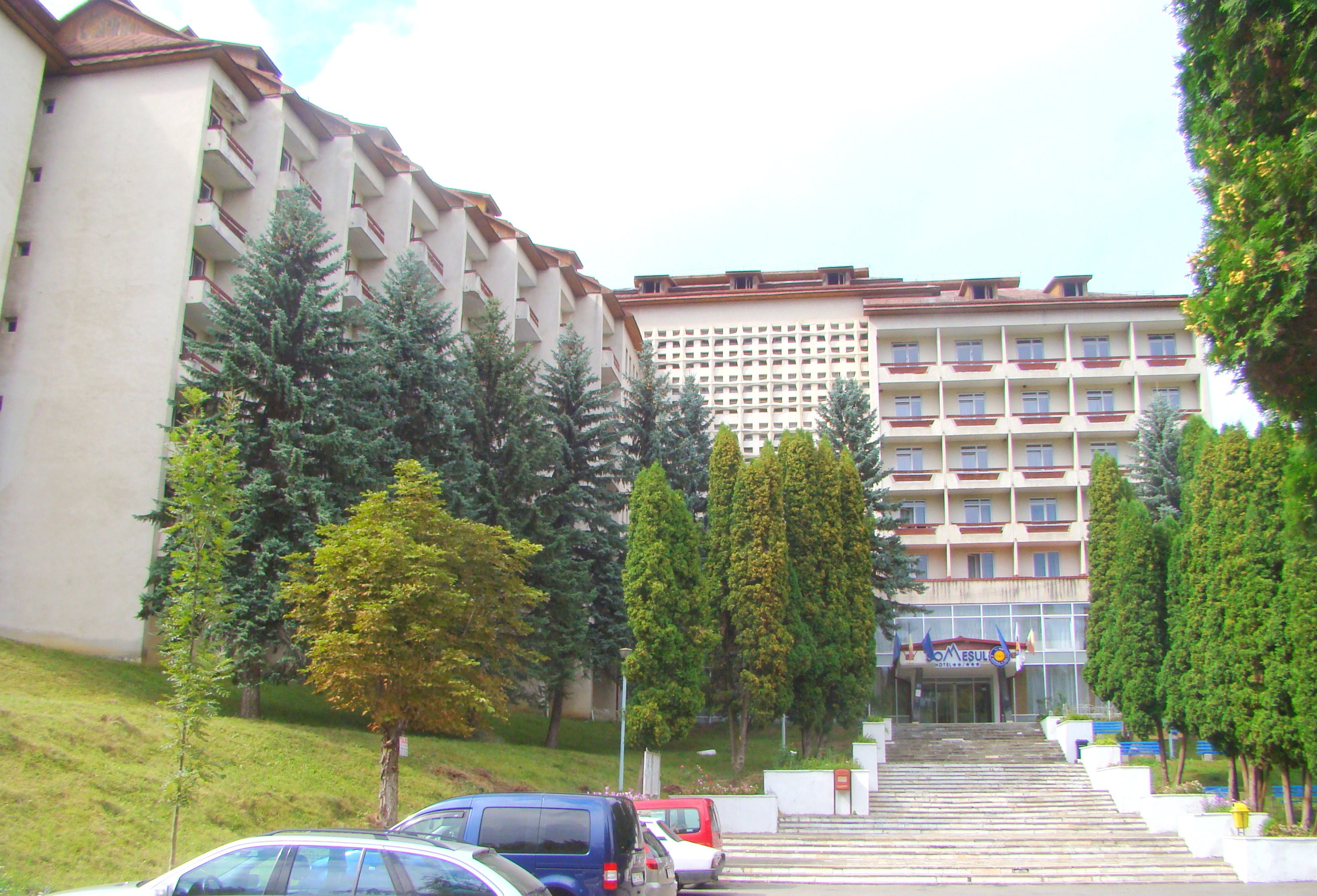 Hotel Someşul din staţiunea Sângeorz-Băi